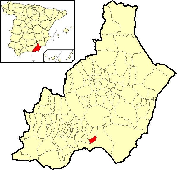 Situación del término municipal de Viator respecto a la provincia de Almería, en España.